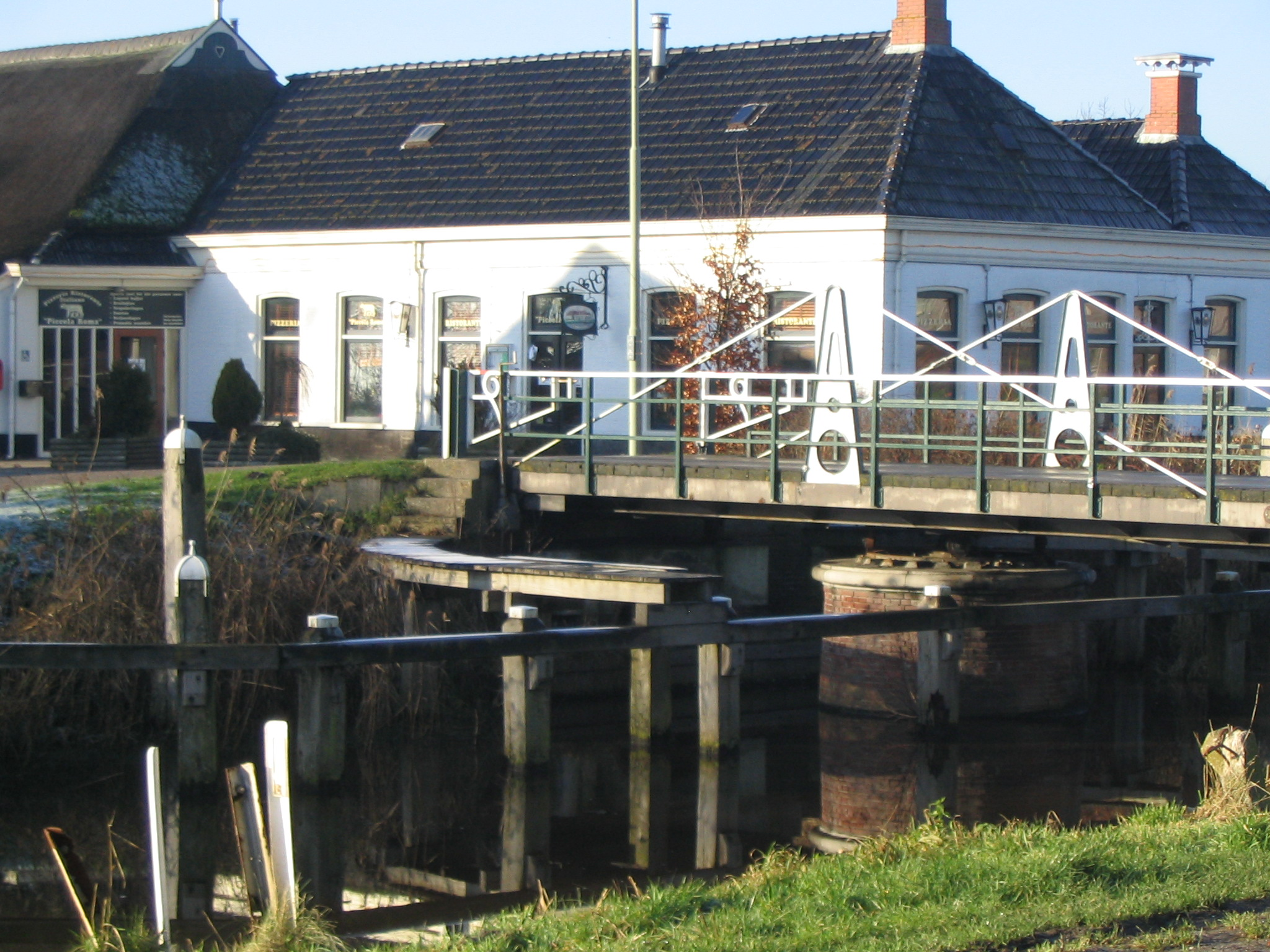 foto van karakteristieke pand in de kern van Briltil. Eigen foto g. klinkenberg. Publicatie toegestaan